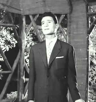 عبد الحليم حافظ في فيلم فتى أحلامي